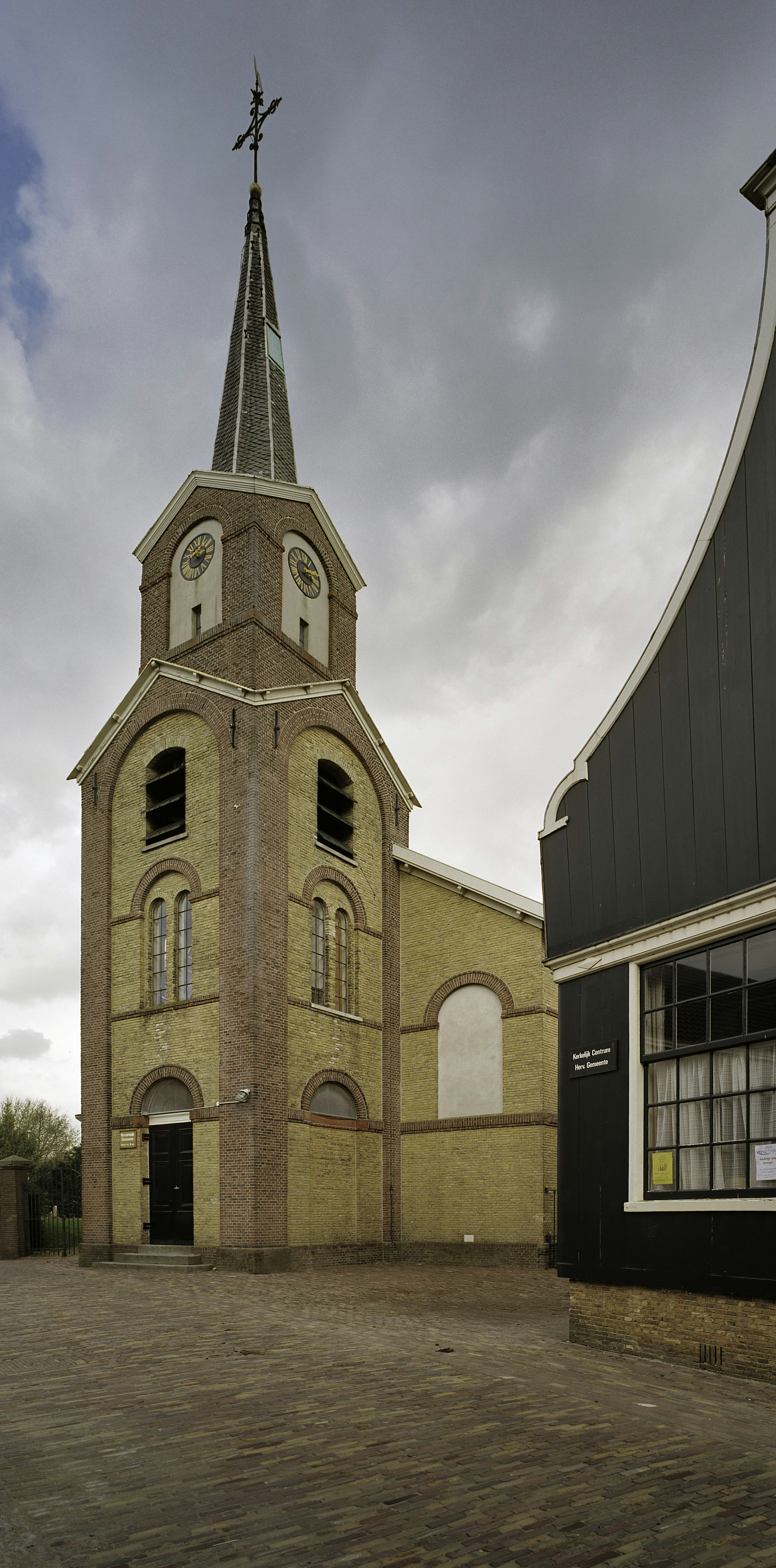 Hervormde Nieuwendammerkerk: Kerk met rondbogen in rode en gele baksteen en toren van twee geledingen met naaldspits (opmerking: Gefotografeerd voor Monumenten In Nederland Noord-Holland)